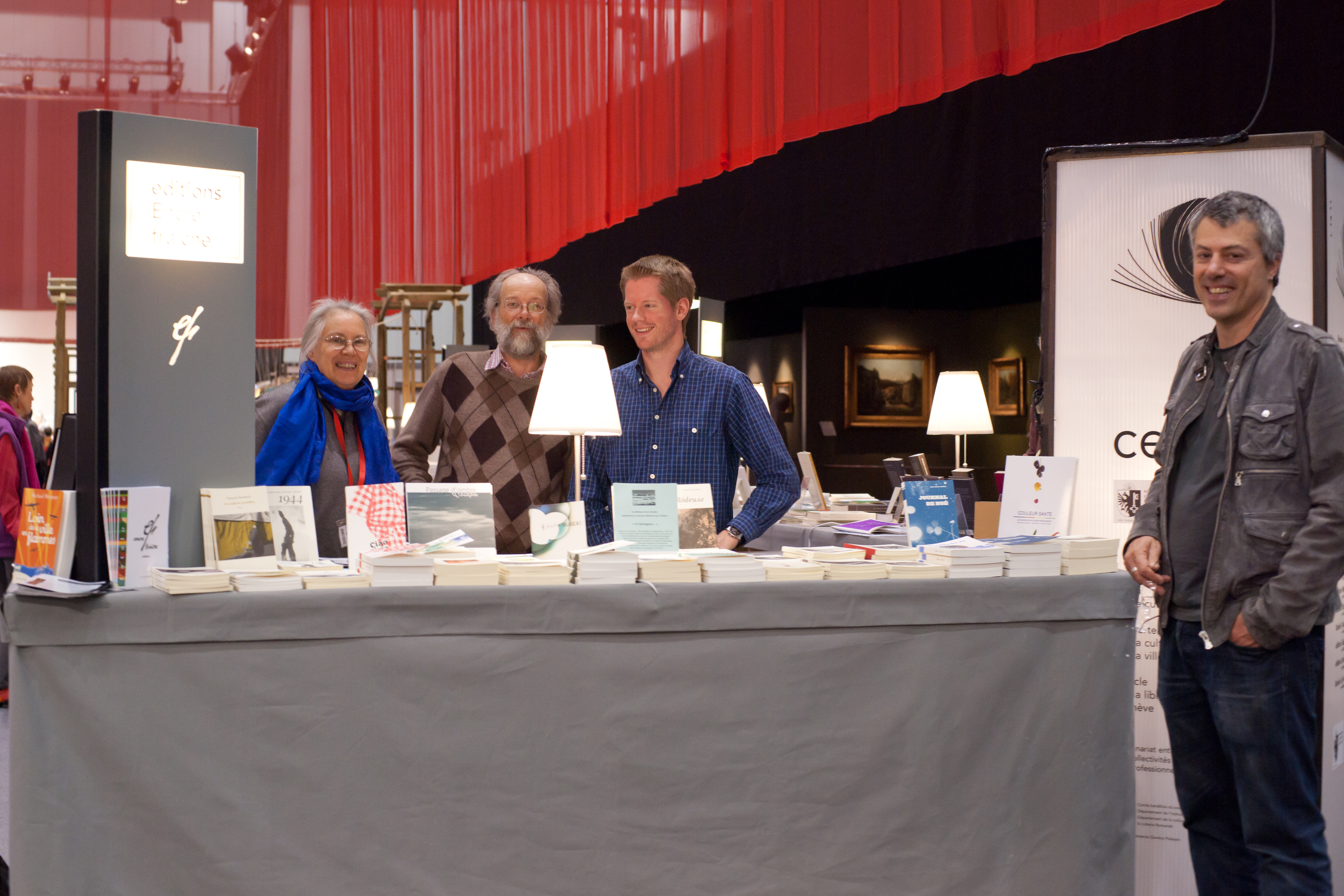 Encre fraîche - salon du livre Genève 2012